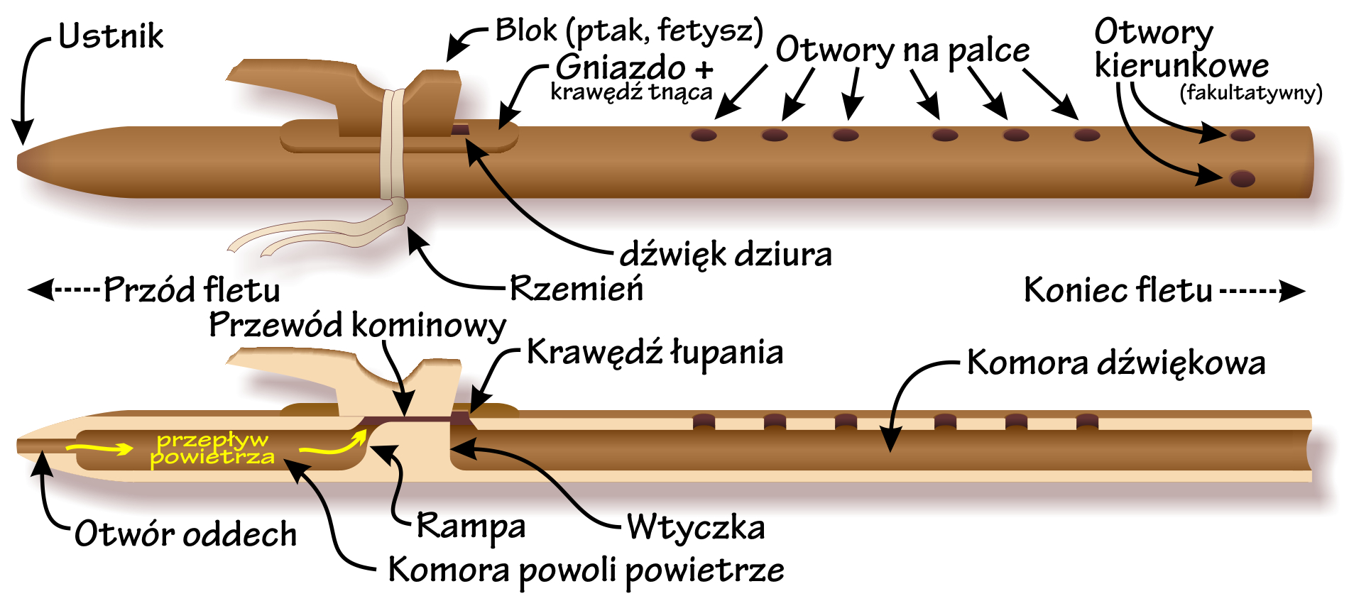 Anatomia fletu indiańskiego.